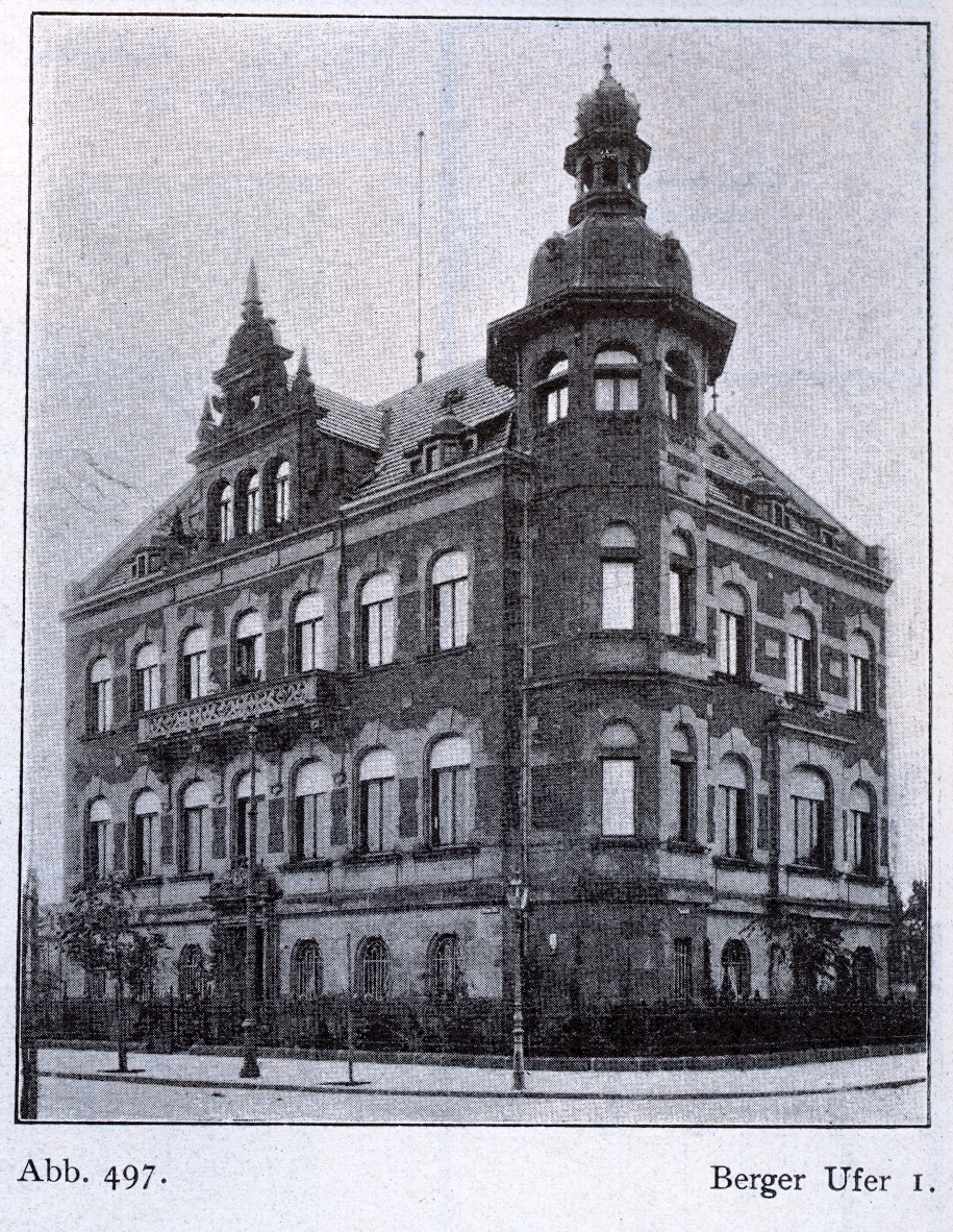 Direktionsgebäude der Dampfschifffahrtsgesellschaft für den Nieder- und Mittelrhein am Berger Ufer 1 (nach 1945 Mannesmannufer genannt) in Düsseldorf, erbaut von Klein & Dörschel im Jahre 1898.jpg